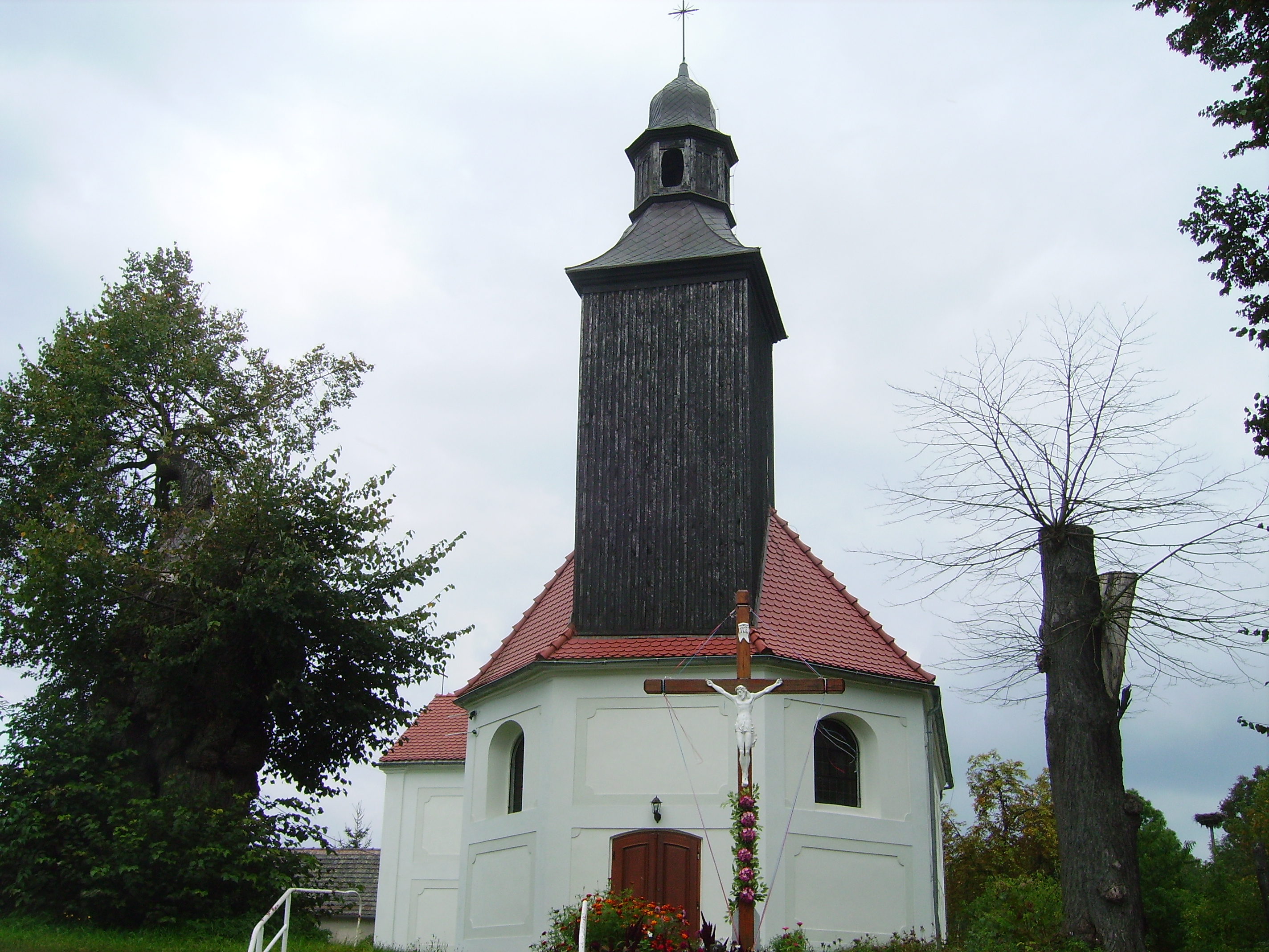 kościół filialny pod wezwaniem Matki Bożej Częstochowskiej z 1745 roku. Rejestr zabytków nr 734 z 15.01.1964